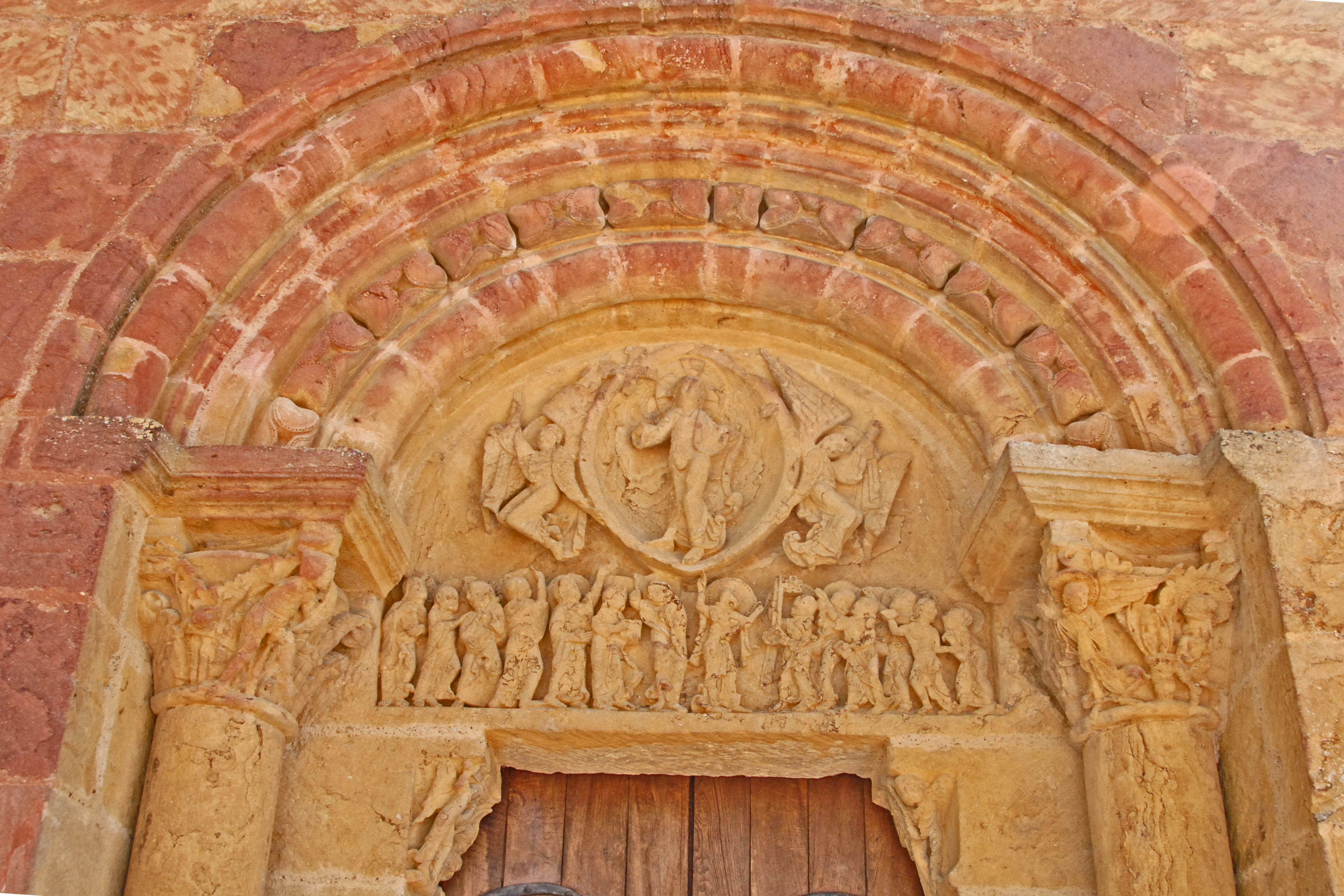 Sts-Pierre-et-Paul de Montceaux-l'Étoile, Tympanon mit Archivolten